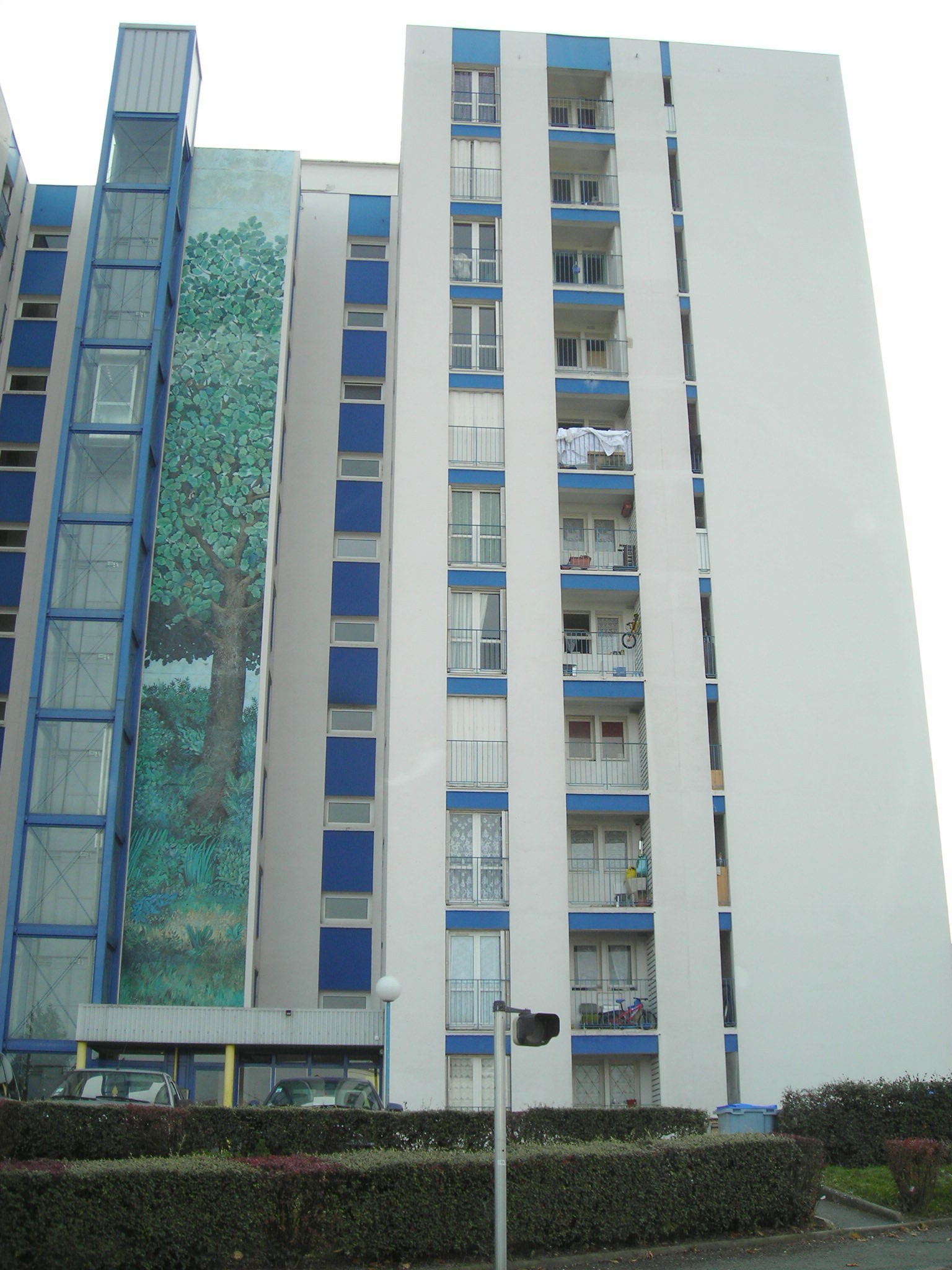 gueret hlm 458e53